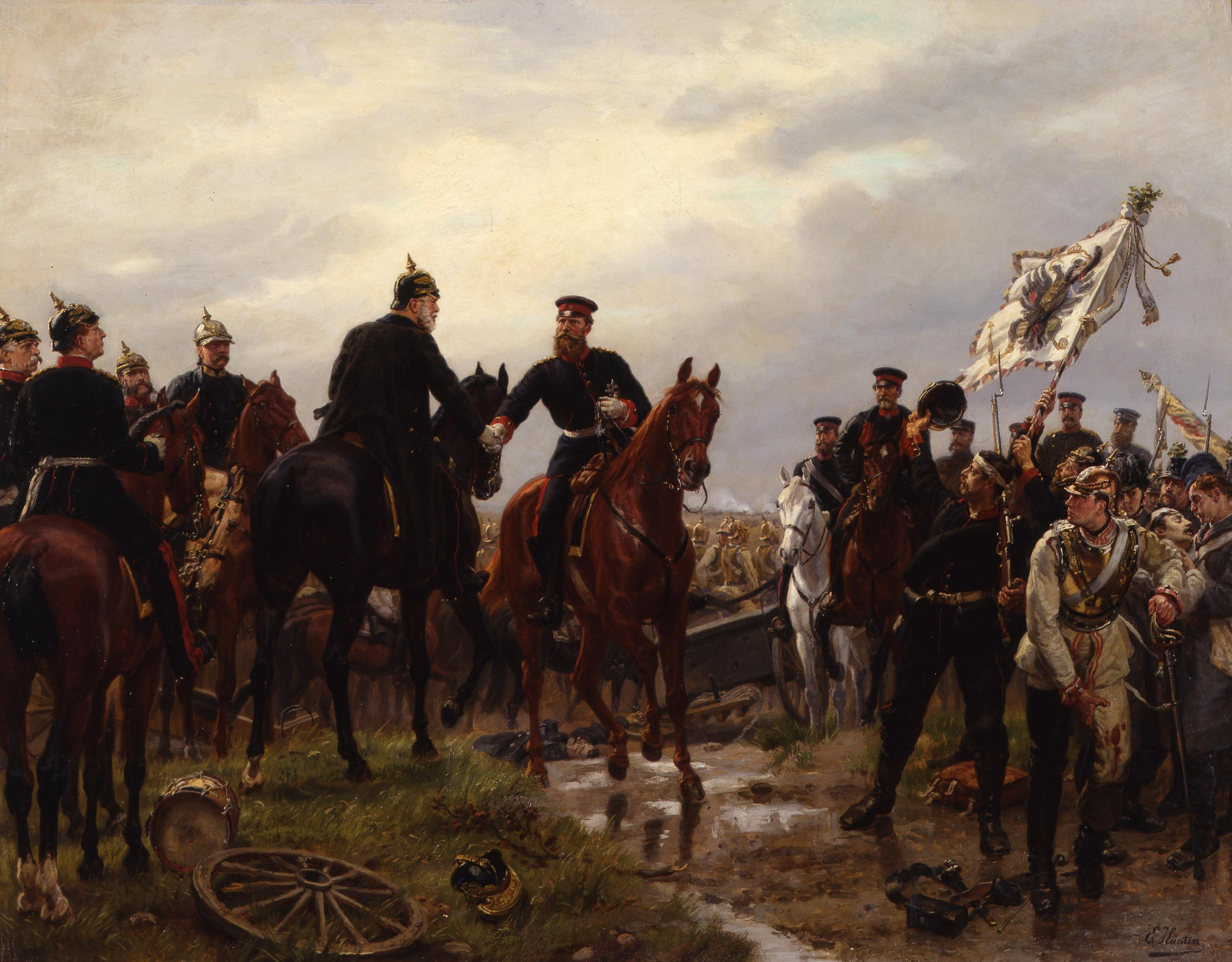 Die 2. preußische Armee (Kronprinzenarmee) hatte durch ihr rechtszeitiges Eingreifen die Schlacht entschieden. Beim Wiedersehen auf dem Schlachtfeld übereichte der König tief ergriffen dem Kronprinzen den Orden "Pour le merite". Generalstabschef Helmuth Moltke ist am linken Bildrand zu erkennen.